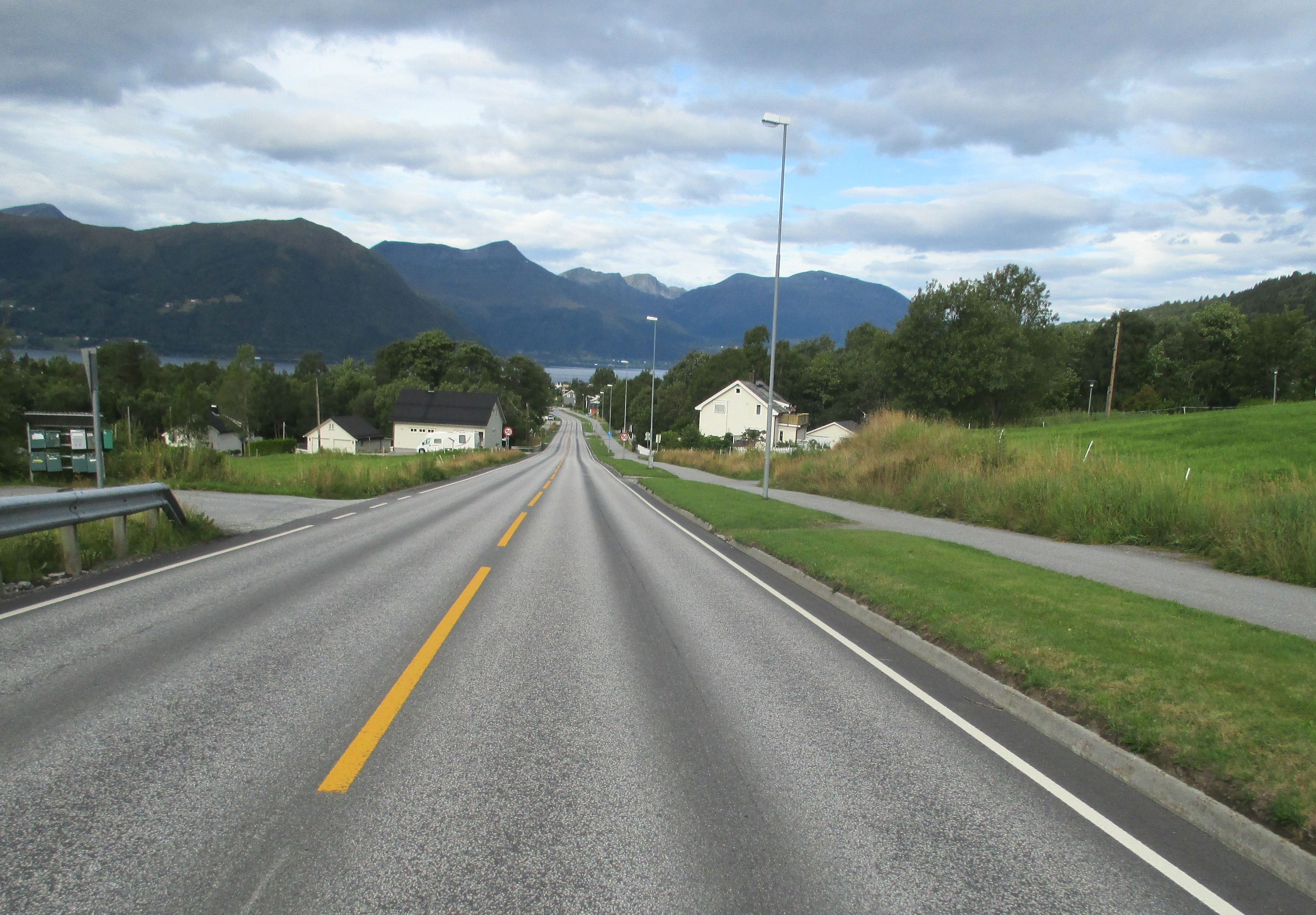 Vikebygdvegen (fylkesvei 45) i Volda